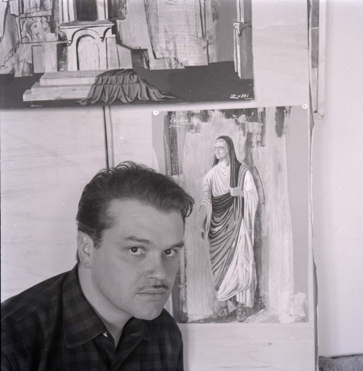 Servizio fotografico : Italia, 1982 / Paolo Monti. - Buste: 11, Fototipi: 11 : Negativo b/n, gelatina bromuro d'argento/ pellicola ; 6x6. - ((Serie costituita da 11 buste di carta, tenute insieme da graffetta, identificate con i nn.: R4547, R4548, R4449, R4550, R4551, R4552, R4553, R4554, R4555, R4556, R4557. - Sulla busta 4547: "Zuffi". - Fonte: Rubrica di Paolo Monti: Archivio 10x12 (ultimi numerati) - dal G1 al (s.d.), presso Archivio Paolo Monti